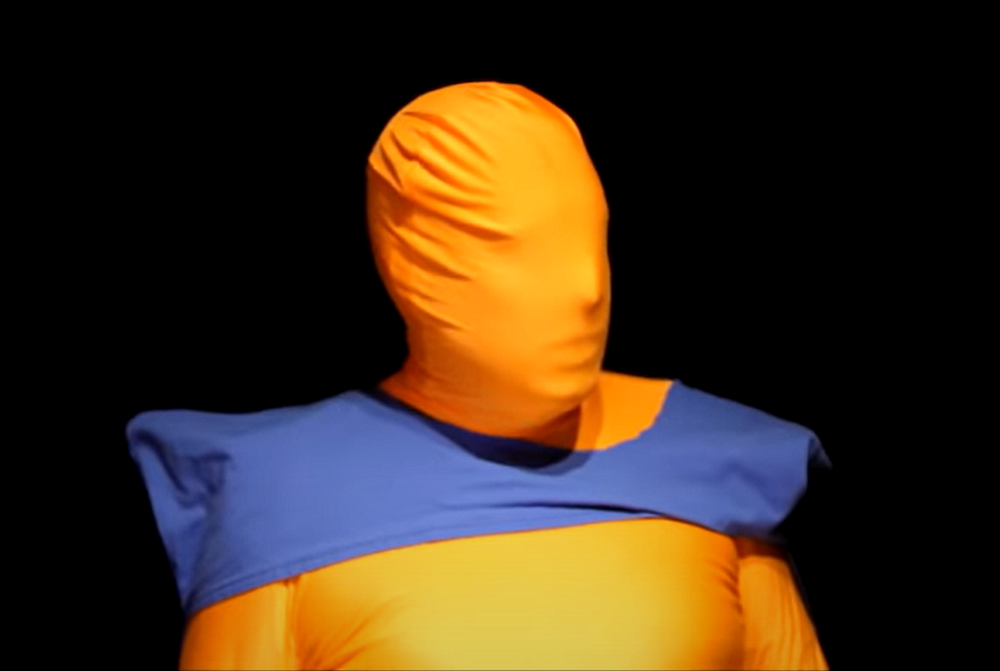 Photo de l'Ami du Bon Goût en décembre 2018.